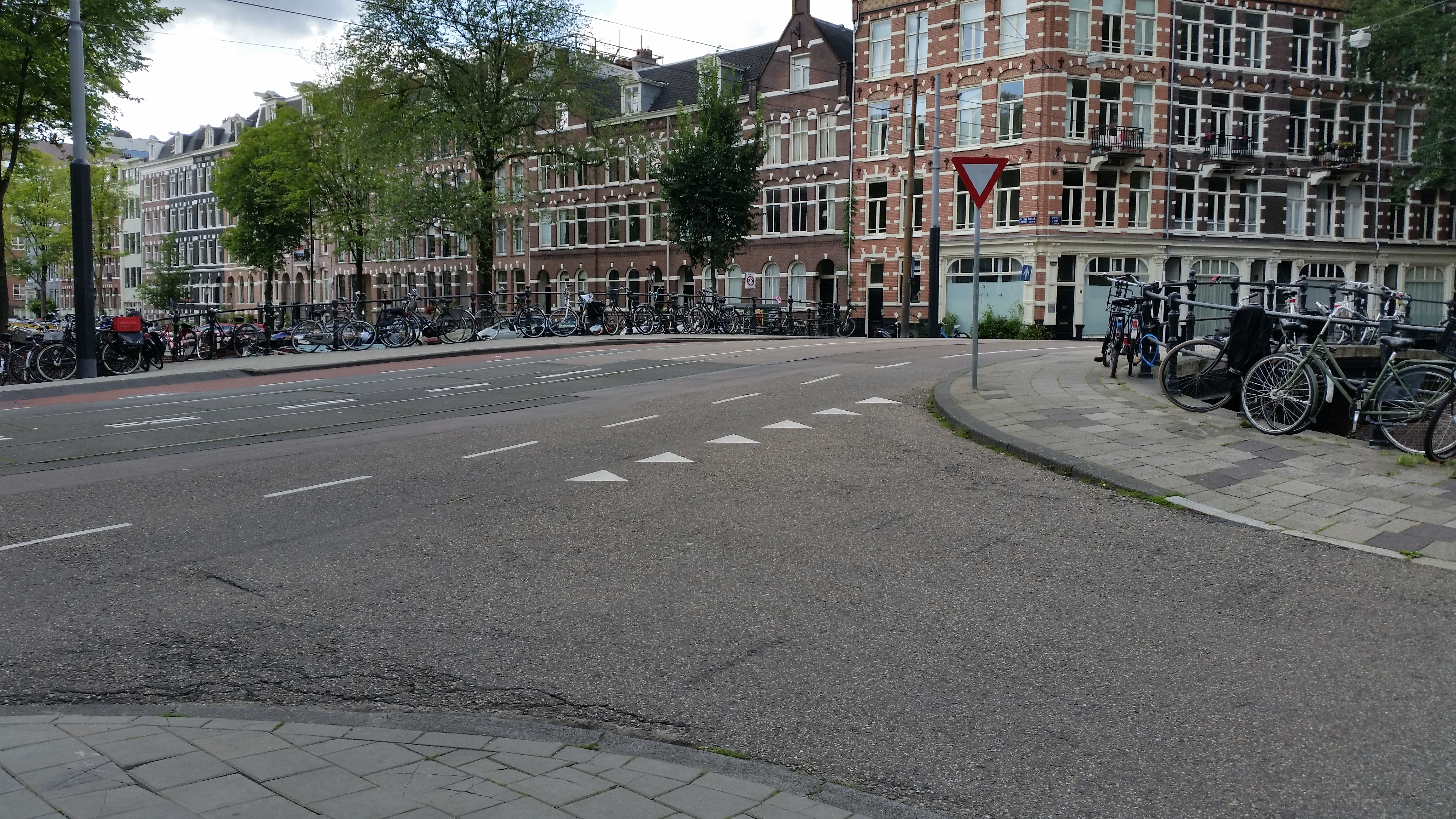 Overzicht over Brug 260, Halverstadbrug